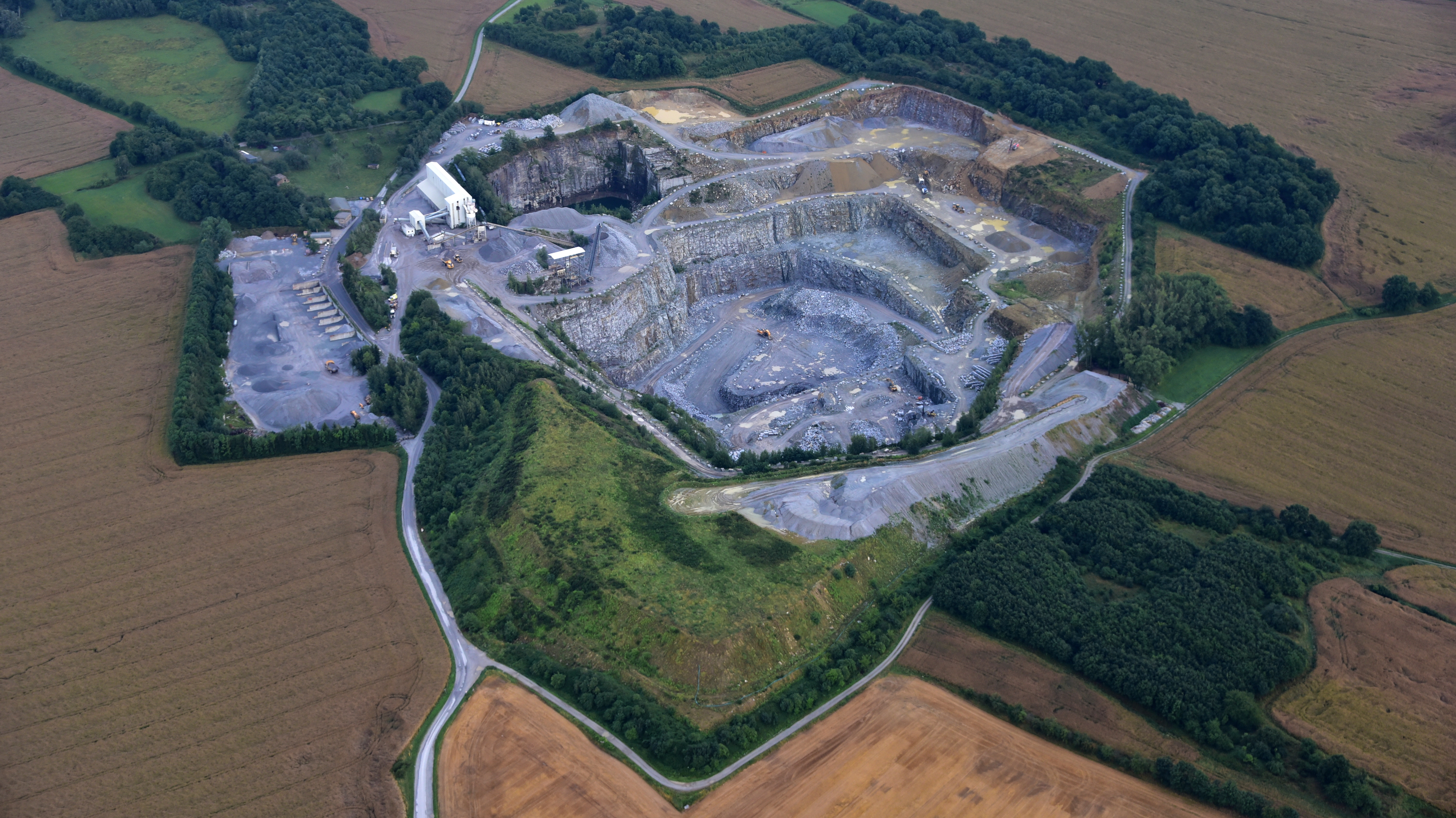 Pließkowitz, Steinbruch, Luftaufnahme (2017) Hornjoserbsce: Powětrowy wobraz skały pola Plusnikec (2017)